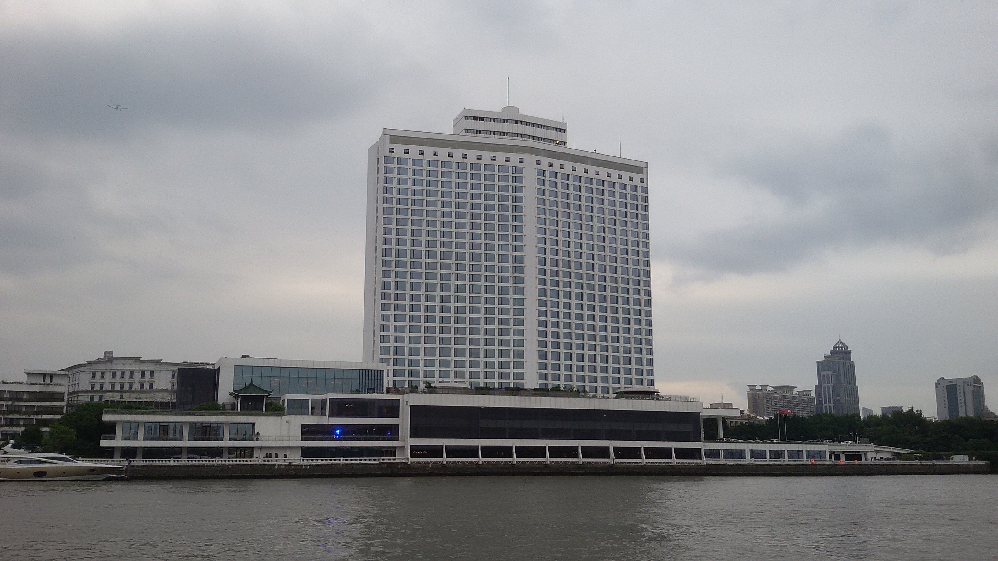 粵語: 白天鵝賓館（2017年10月14號）